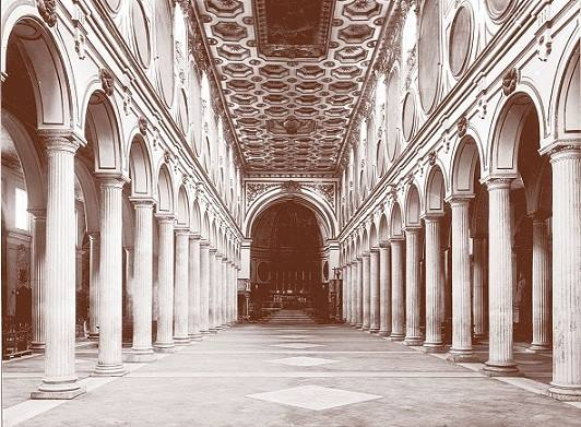 Benevento - Duomo, veduta dell'interno (prima della sua distruzione a seguito dei bombardamenti del 1943). Autore della foto sconosciuto.